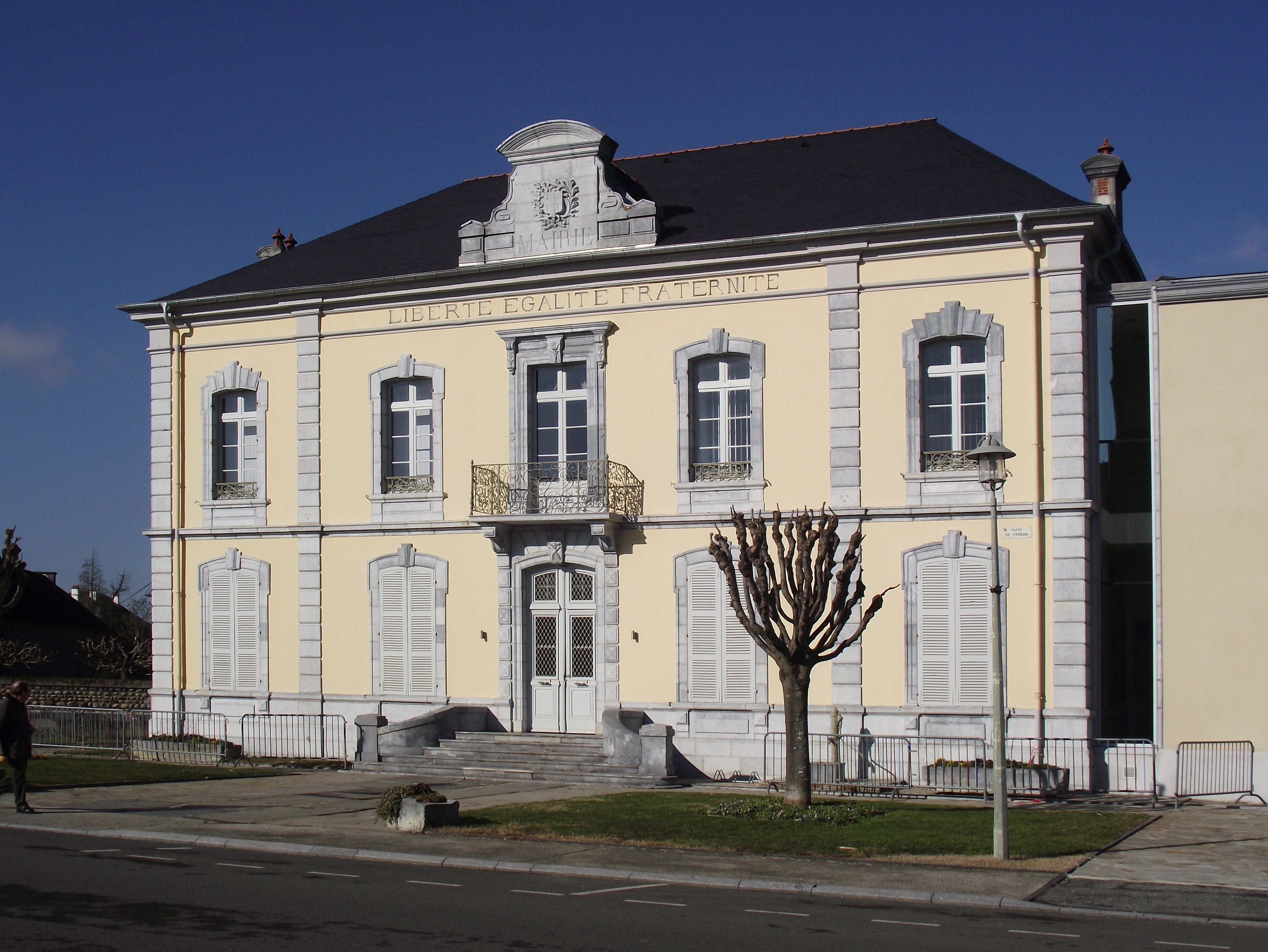 Mairie d'Ibos (Hautes-Pyrénées, France)